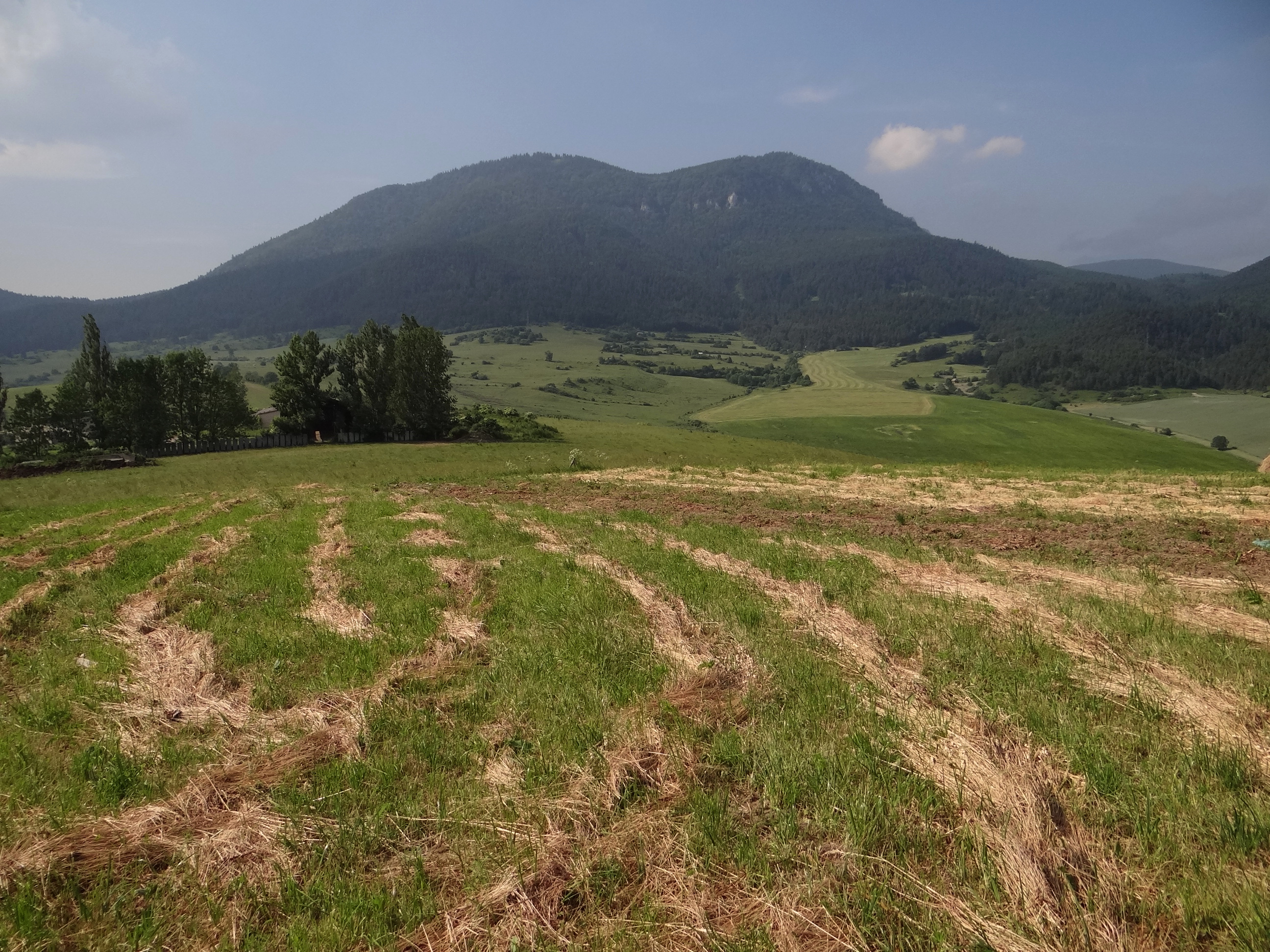 Przedni Chocz, widok od południowej strony